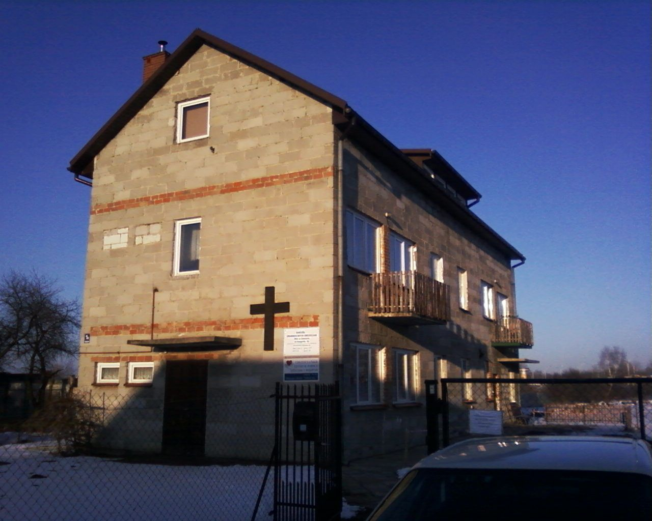 Kościół Ewangelicznych Chrześcijan w Zamościu